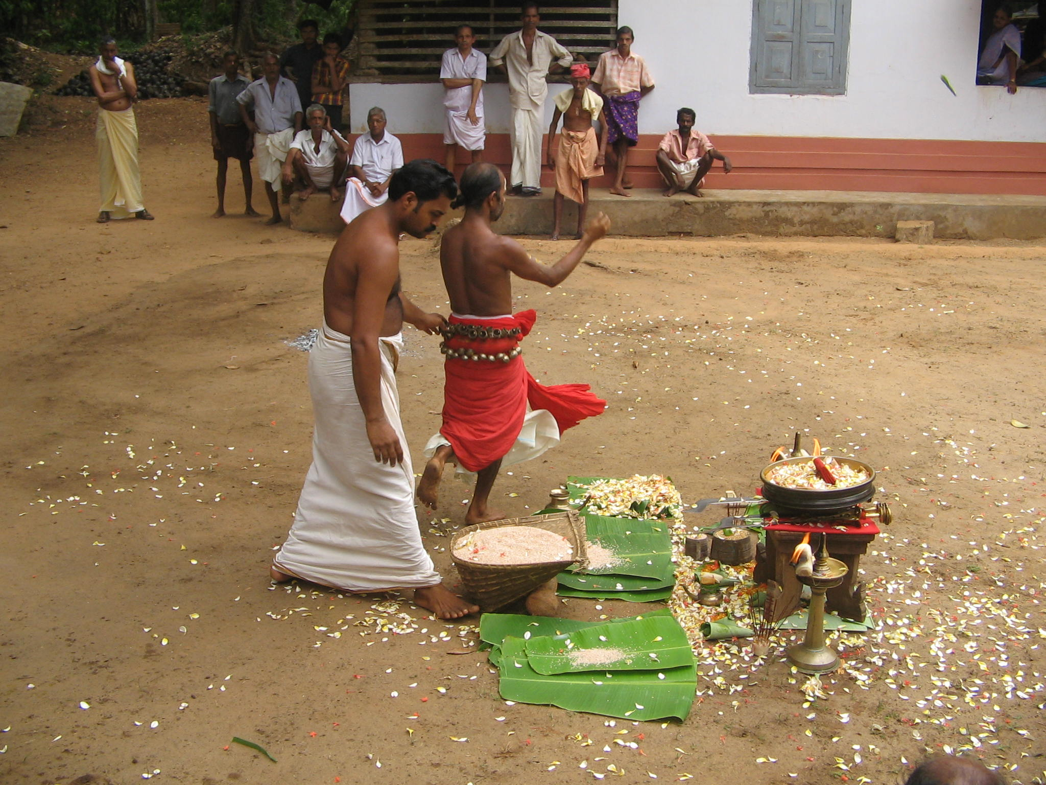 വെളിച്ചപ്പെടൽ. സ്ഥലം: വെള്ളക്കാട്ടുമന